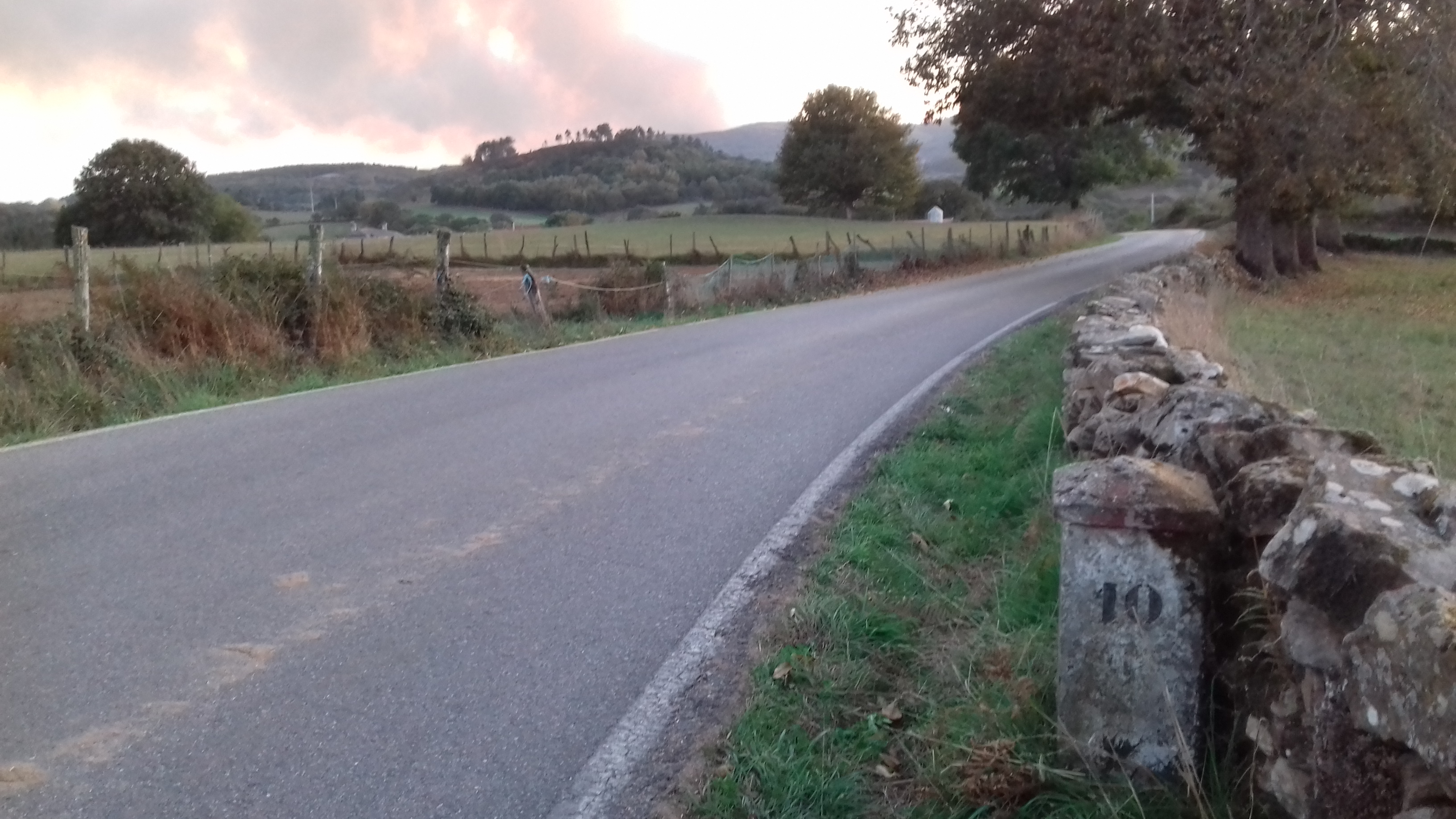 Fito e monte do Faro ardendo